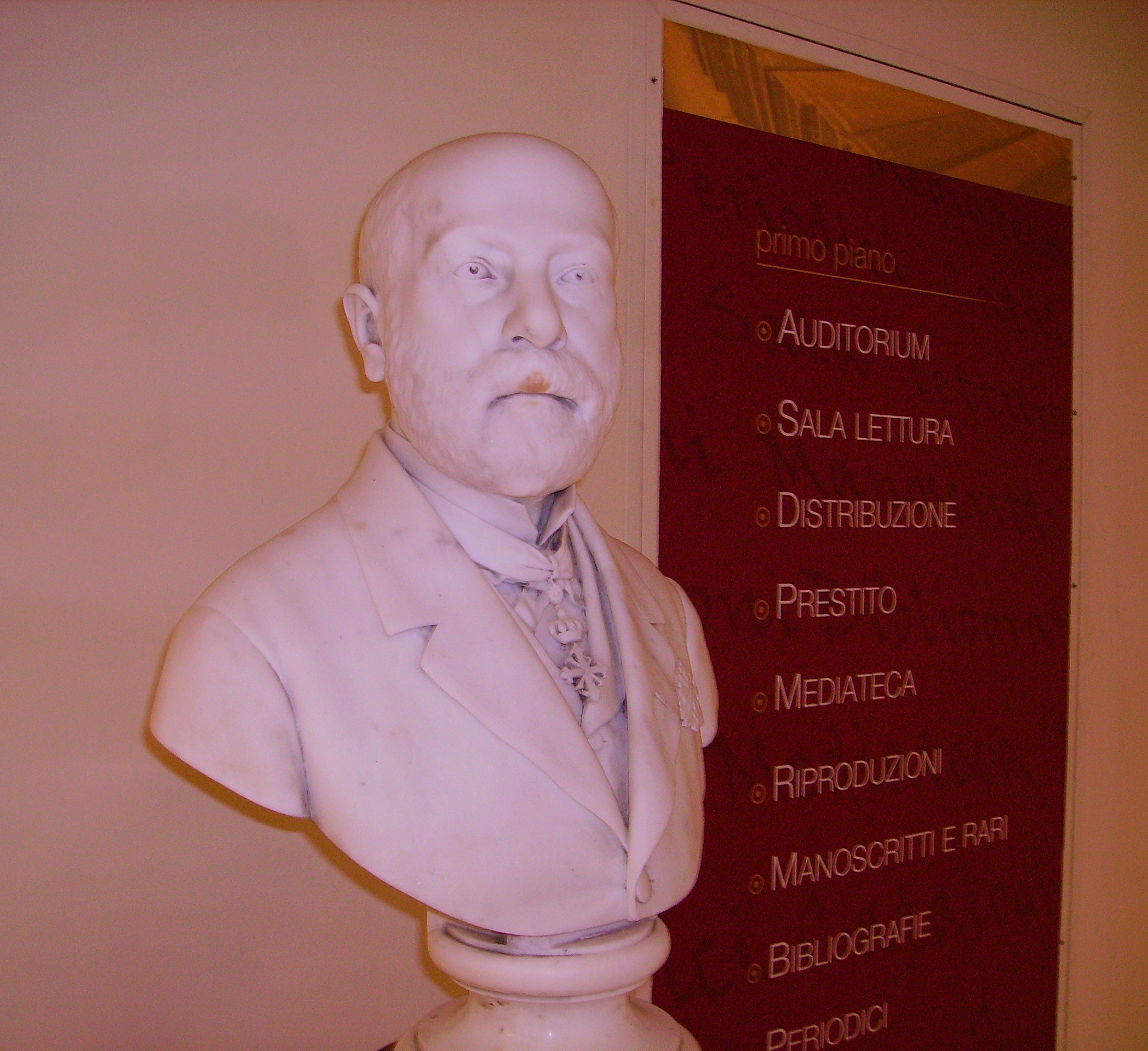 Busto di Girolamo Sagarriga Visconti Volpi custodito nella biblioteca Nazionale di Bari